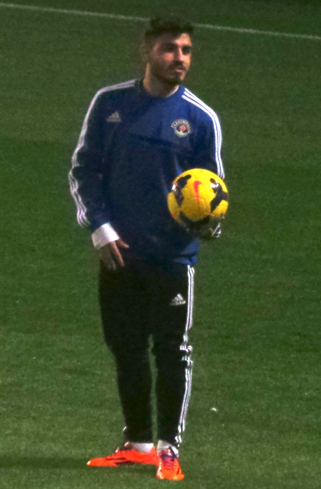 Erhan Kartal